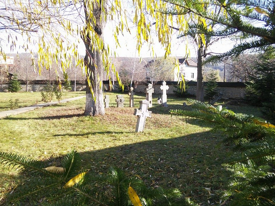 Zid de incintă 03